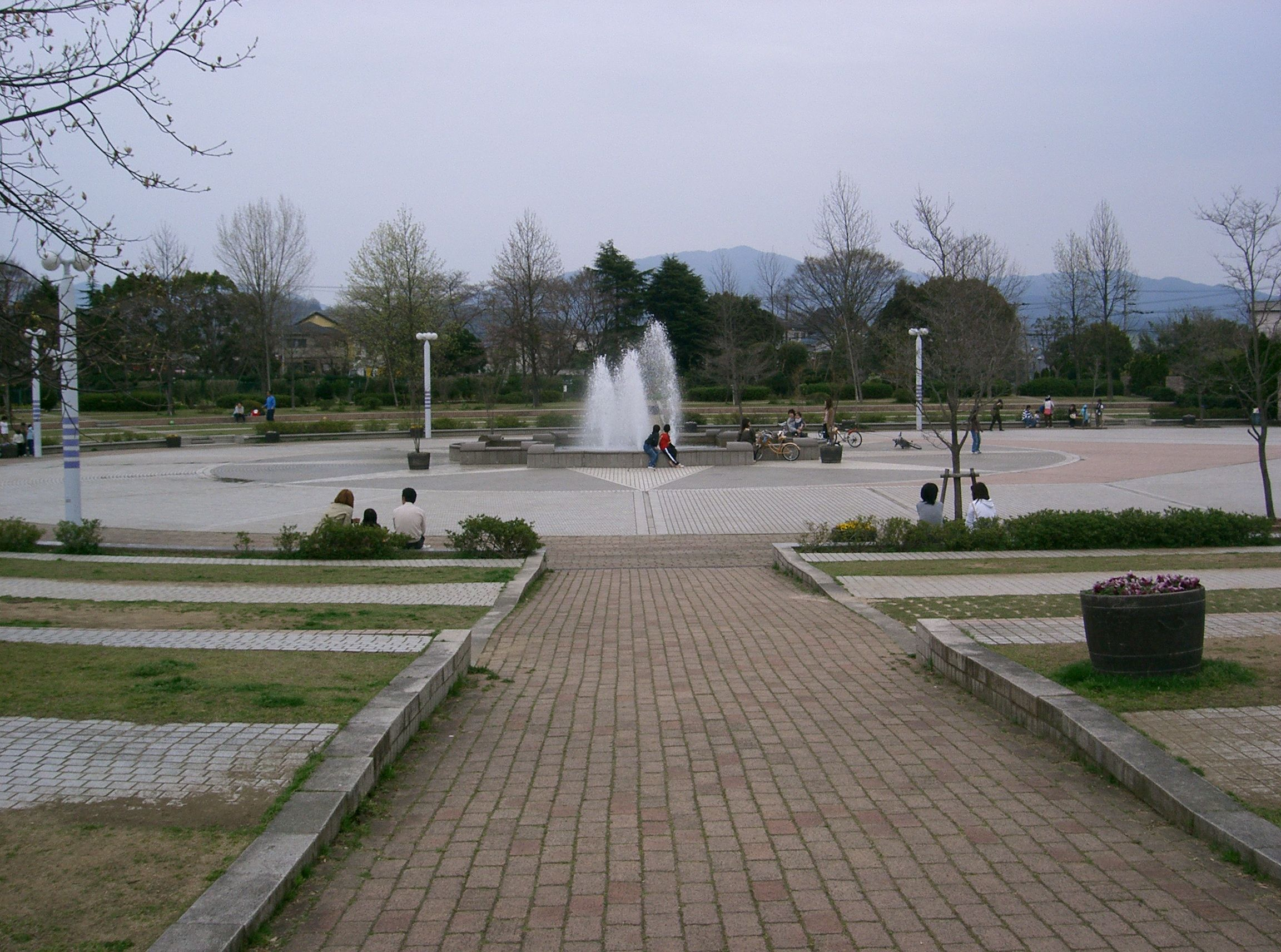 Teragaike Park